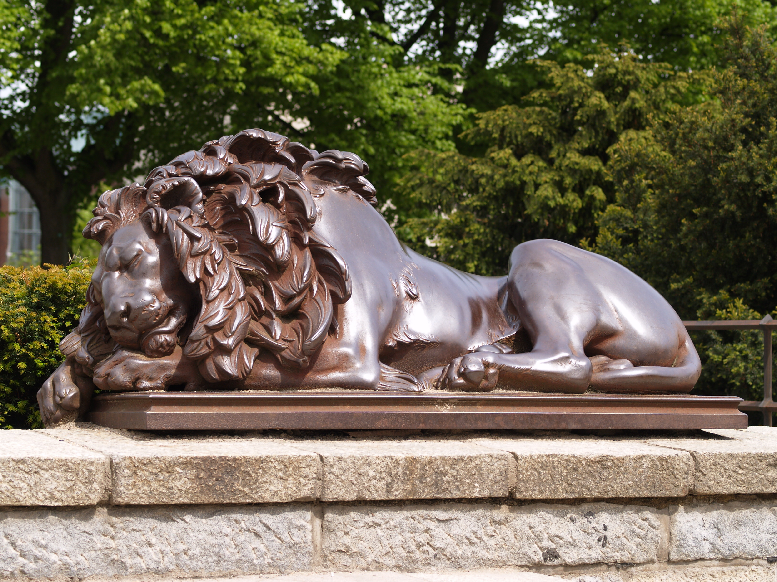 The Lübecker Lions, 1823, (Christian Daniel Rauch zugeschrieben) in front of the Holstentor, north one